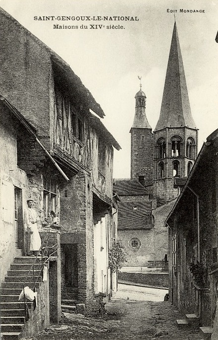 Saint-Gengoux-le-National (département de Saône-et-Loire), maisons du XIVe siècle ; carte postale ancienne.